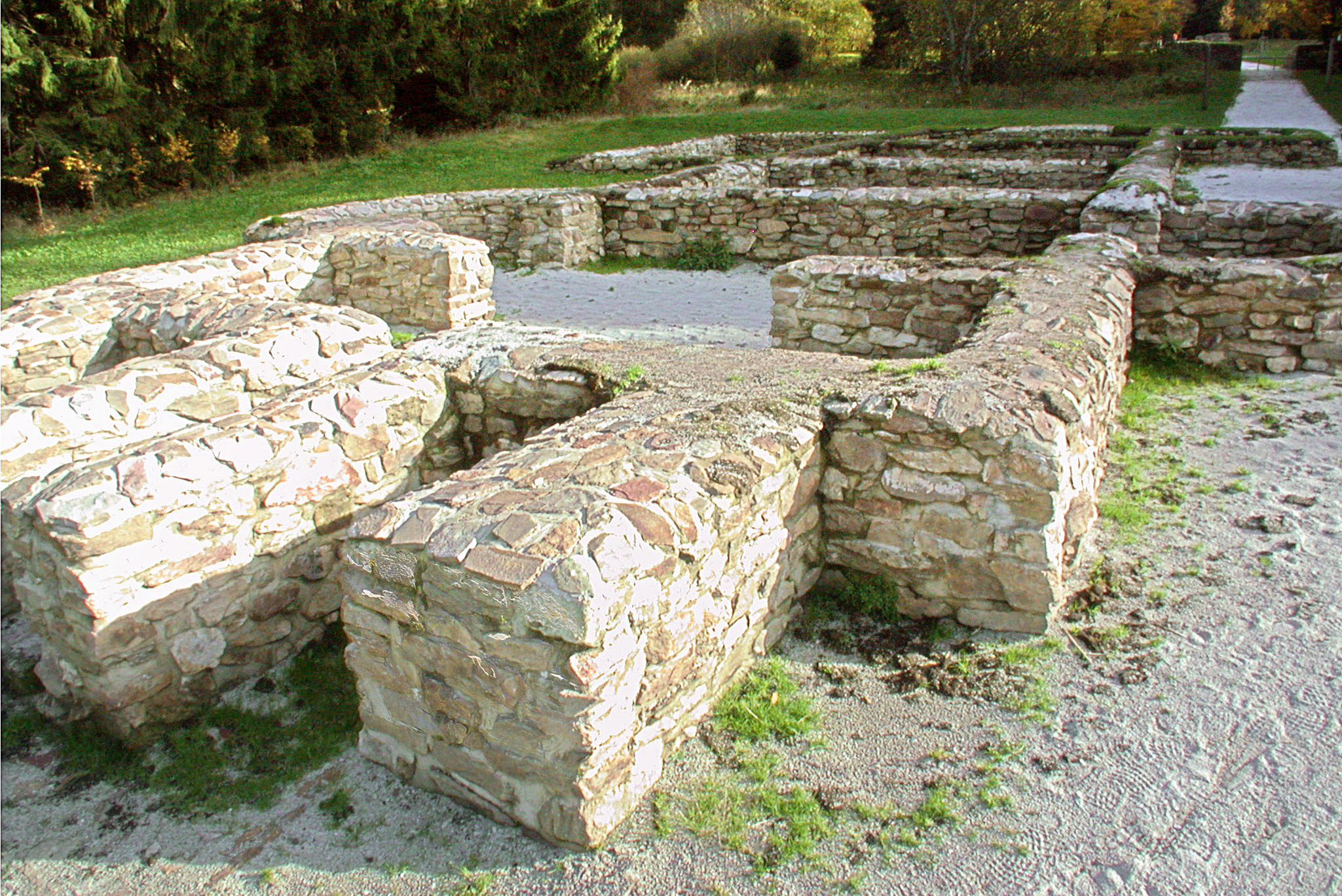 Feldbergkastell, Deutschland, Grundmauern des Bades. Im Vordergrund die Heizanlage (praefurnium) mit dem Feuerkanal zu dem Unterboden der hypokaustierten Baderäume.